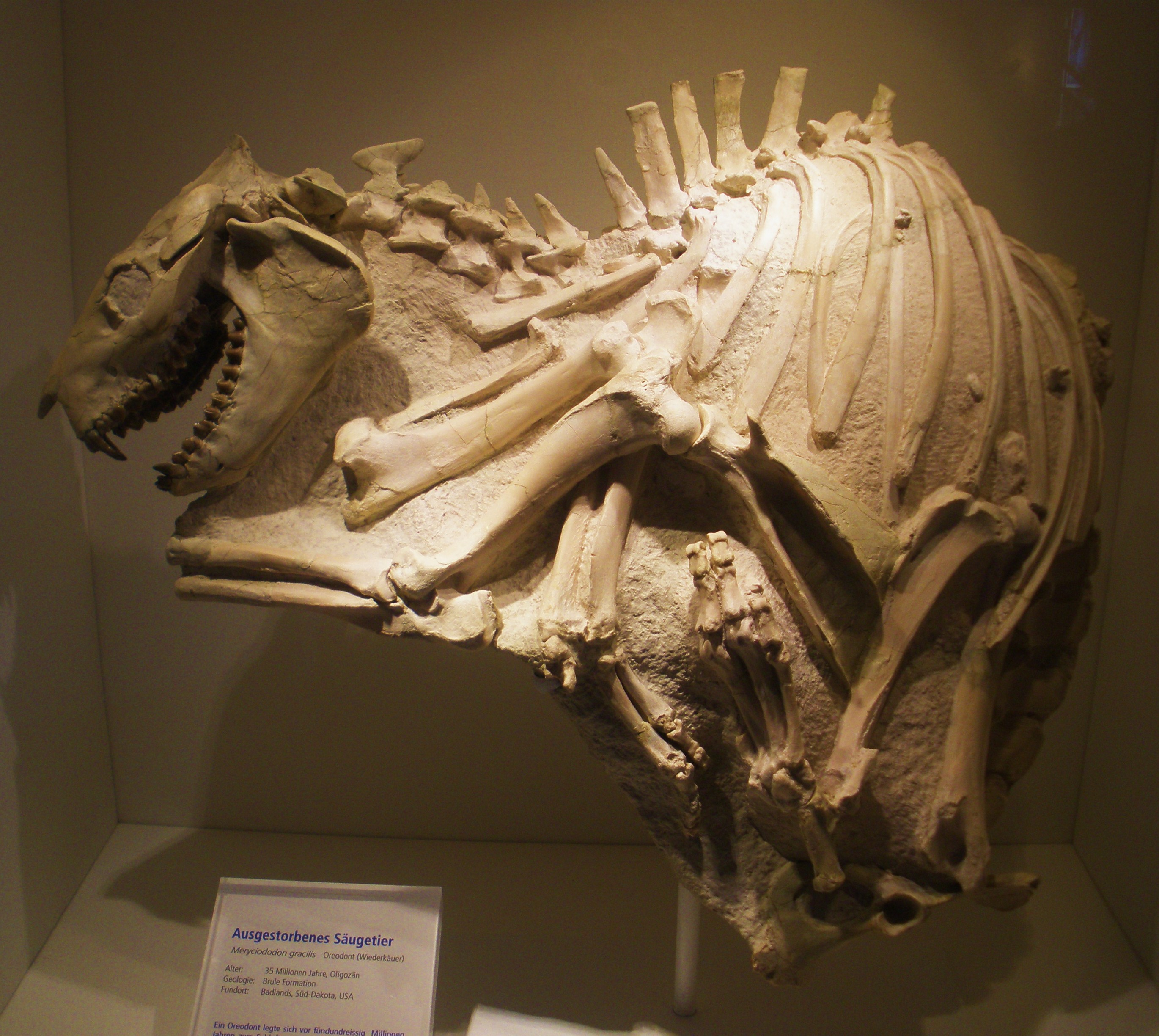 fossil Merycoidodon